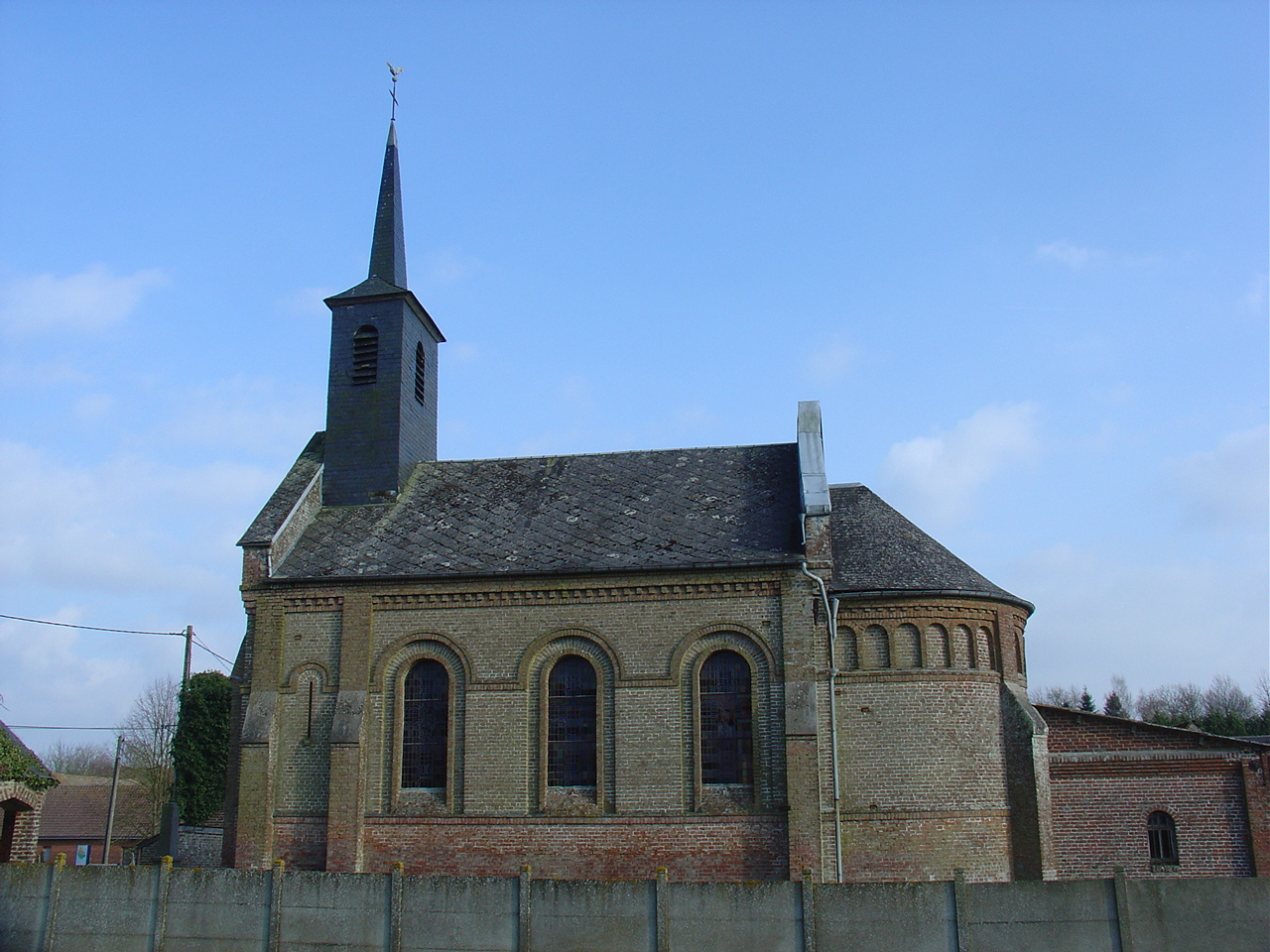 Église de Rougefay